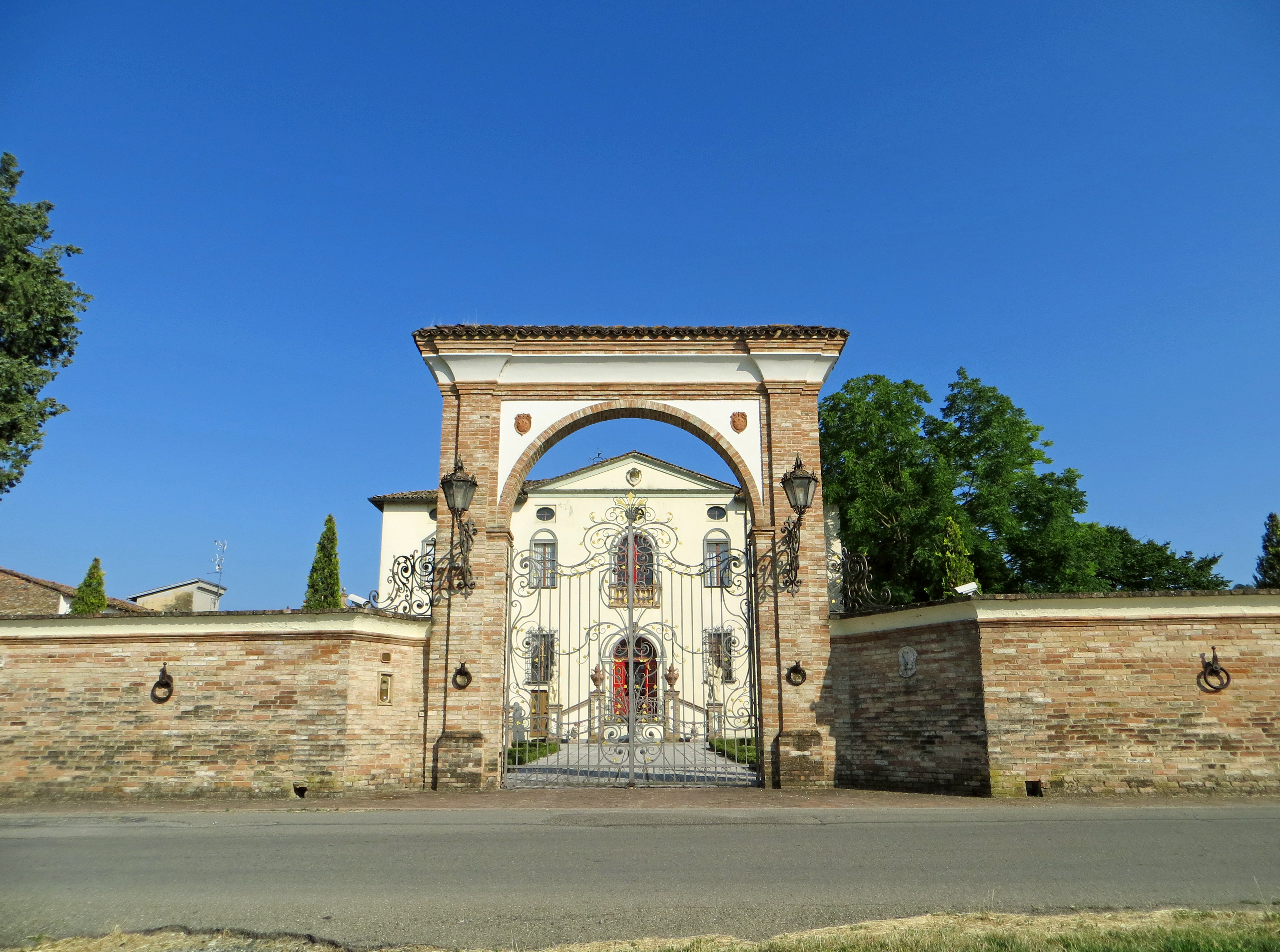 Villa Lanfranchi (Santa Maria del Piano, Lesignano de' Bagni) - cancellata d'ingresso